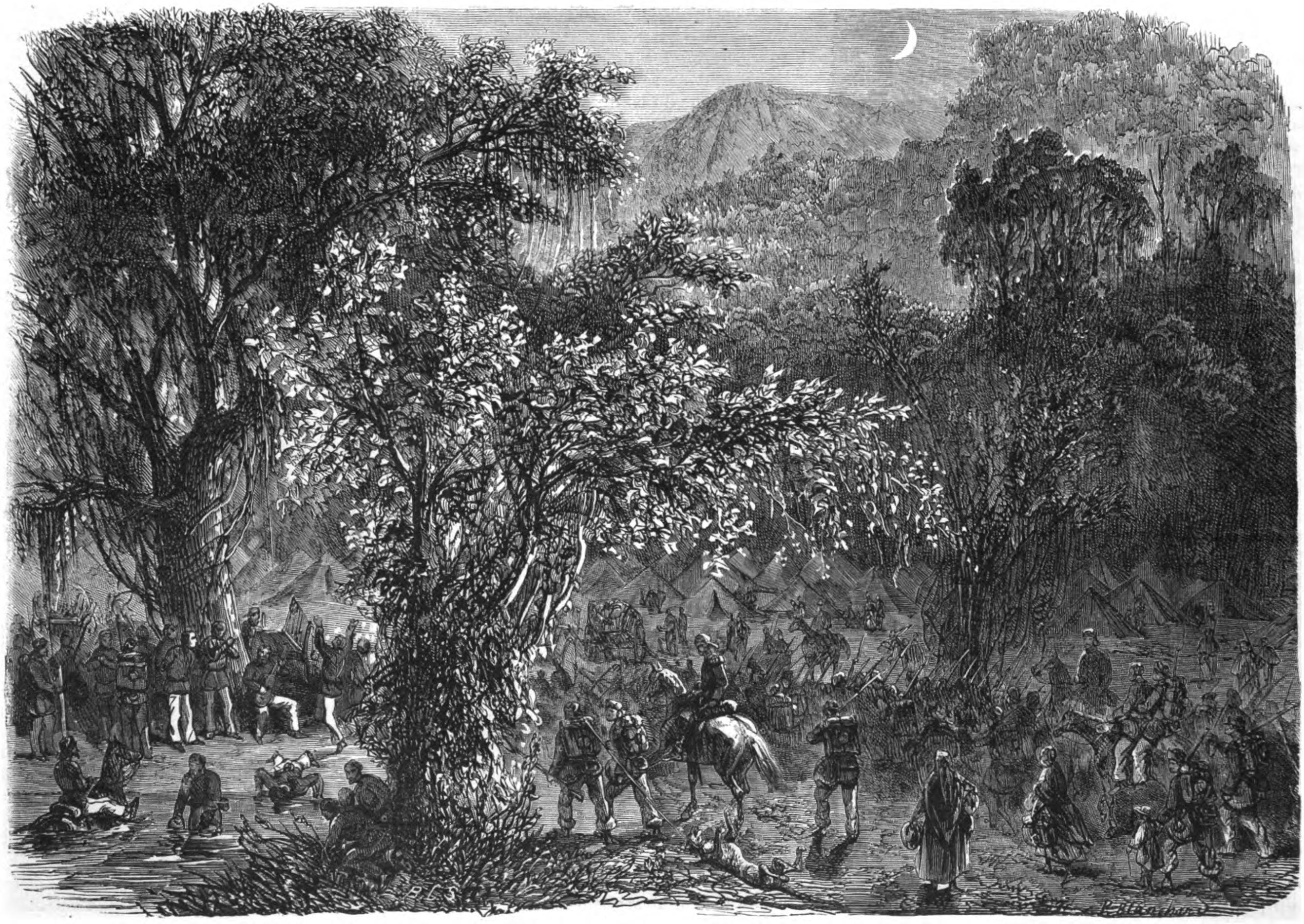 Expédition brésilienne pour Matto-Grosso. Campement de la division expéditionnaire dans les forèts vierges de Goyaz, à Rio des Bois. - D'après un croquis envoyé par M. Paranhos junior.